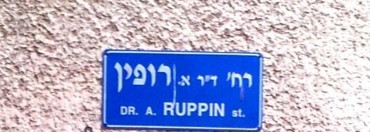 שלט רחוב רופין בתל אביב